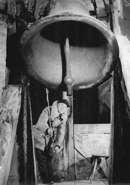 Haynrode, Neujahr, Läuten der Glocke Zentralbild TBD-Schmidt 12.12.1954 -2683- 1309. A.-V. 24.12.1954 Friede auf Erden läuten die Glocken von Haynrode. UBz: Auf dem Glockenturm der alten Dorfkirche von Haynrode läutet der Glöckner Wilker das Neue Jahr ein.